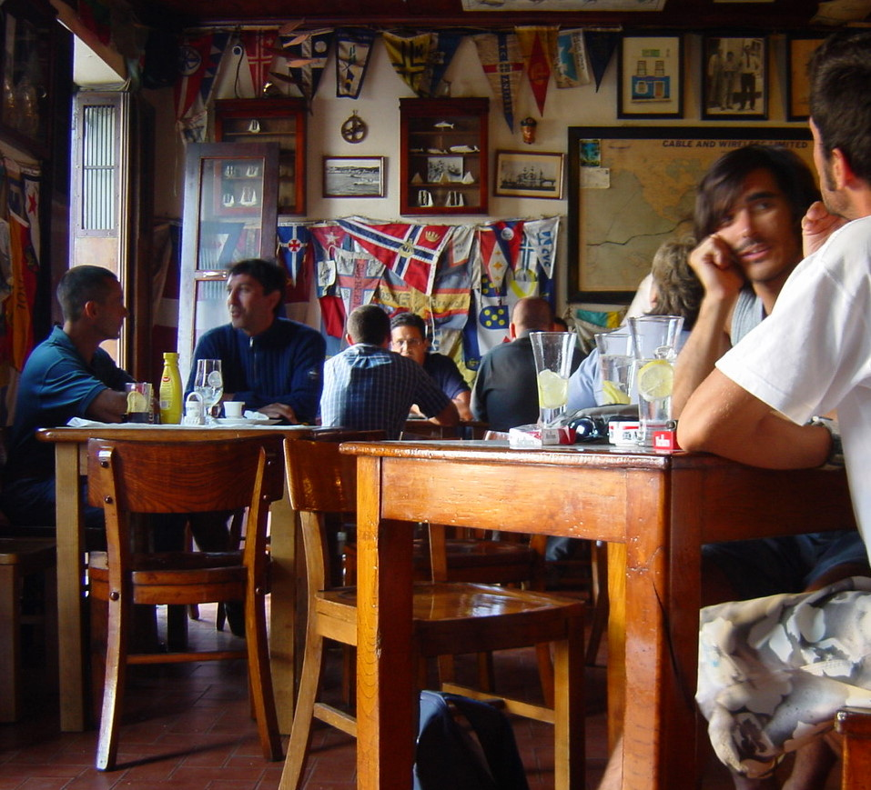 Peter's Bar